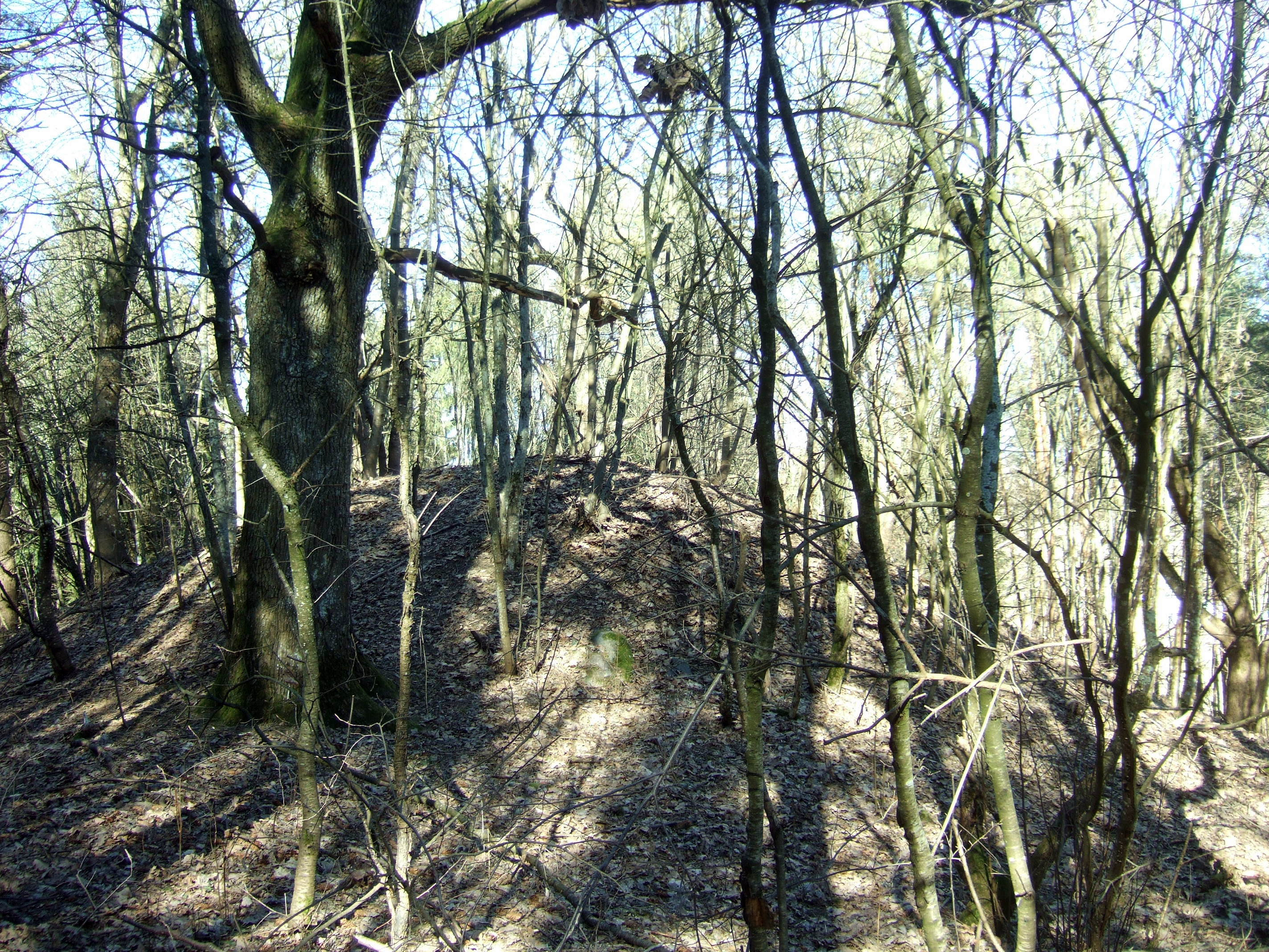 Pikutiškių, Švedų piliakalnio pylimas